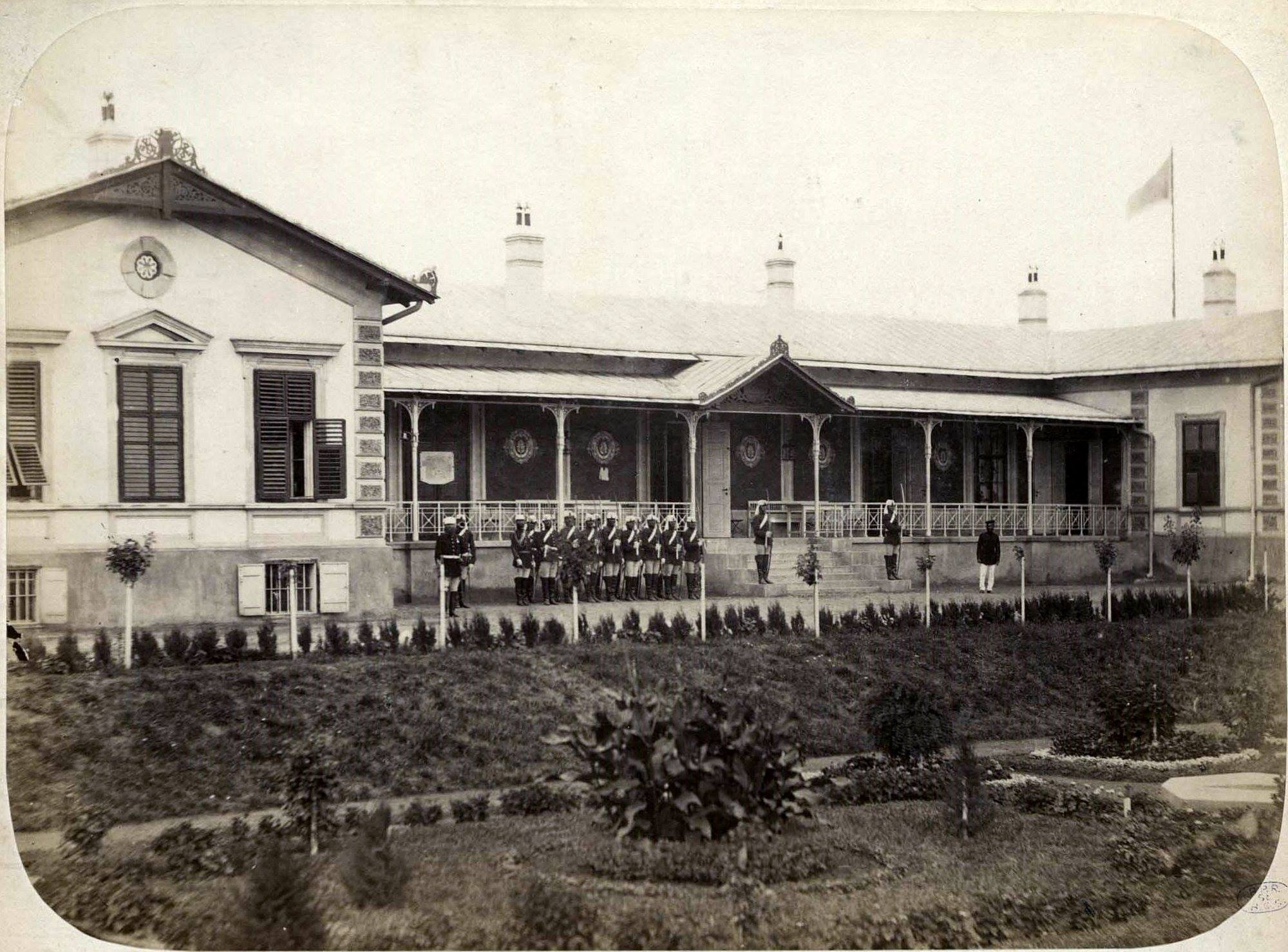 Carol Popp de Szathmary - Casa Miloş Obrenovici din Poiana Mare Pavilionul Obrenovici pe atunci Marele Cartier General al Armatei Romane in razboiul de Independenta